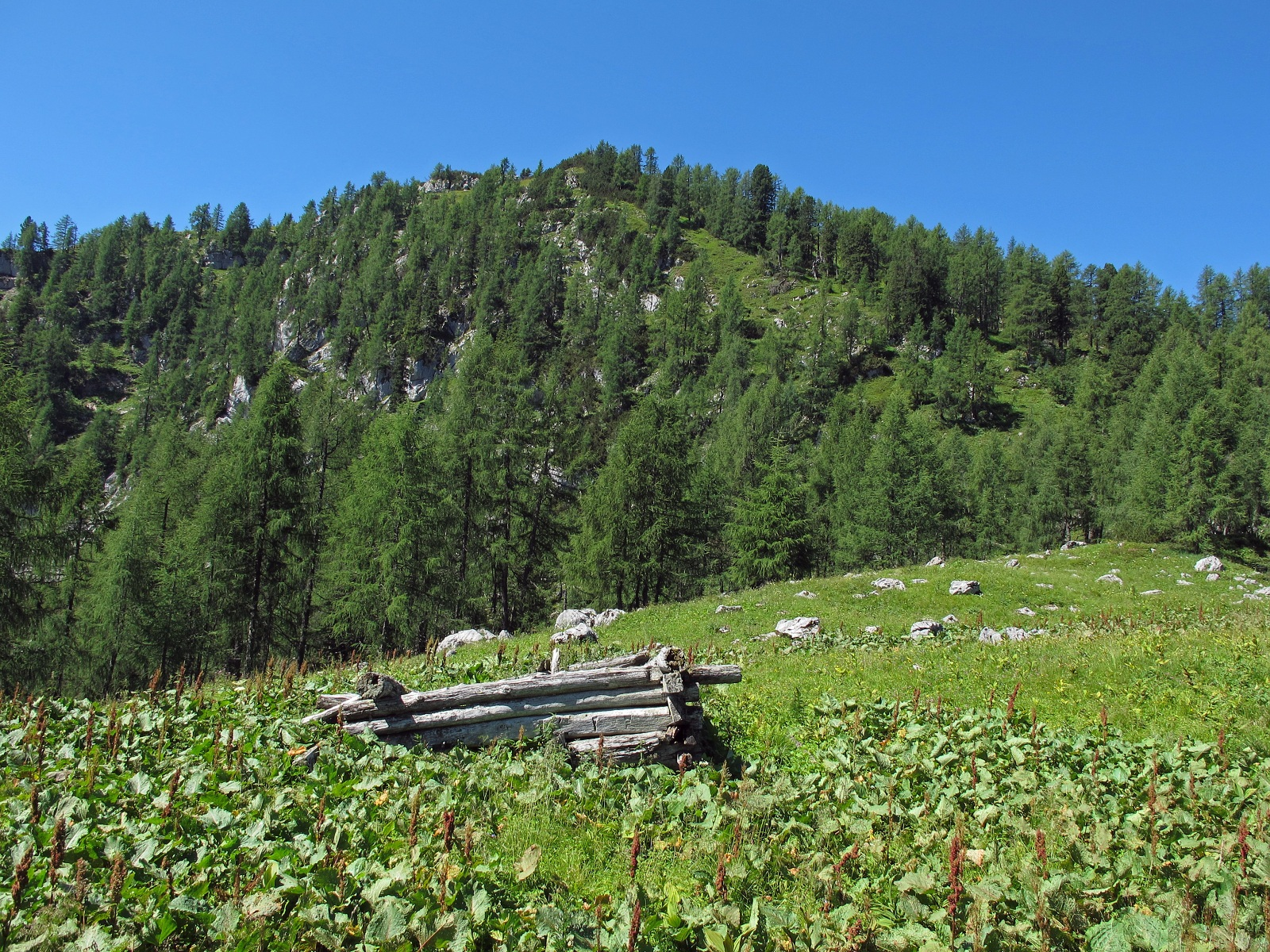 Die Reste der Rotwandalm.